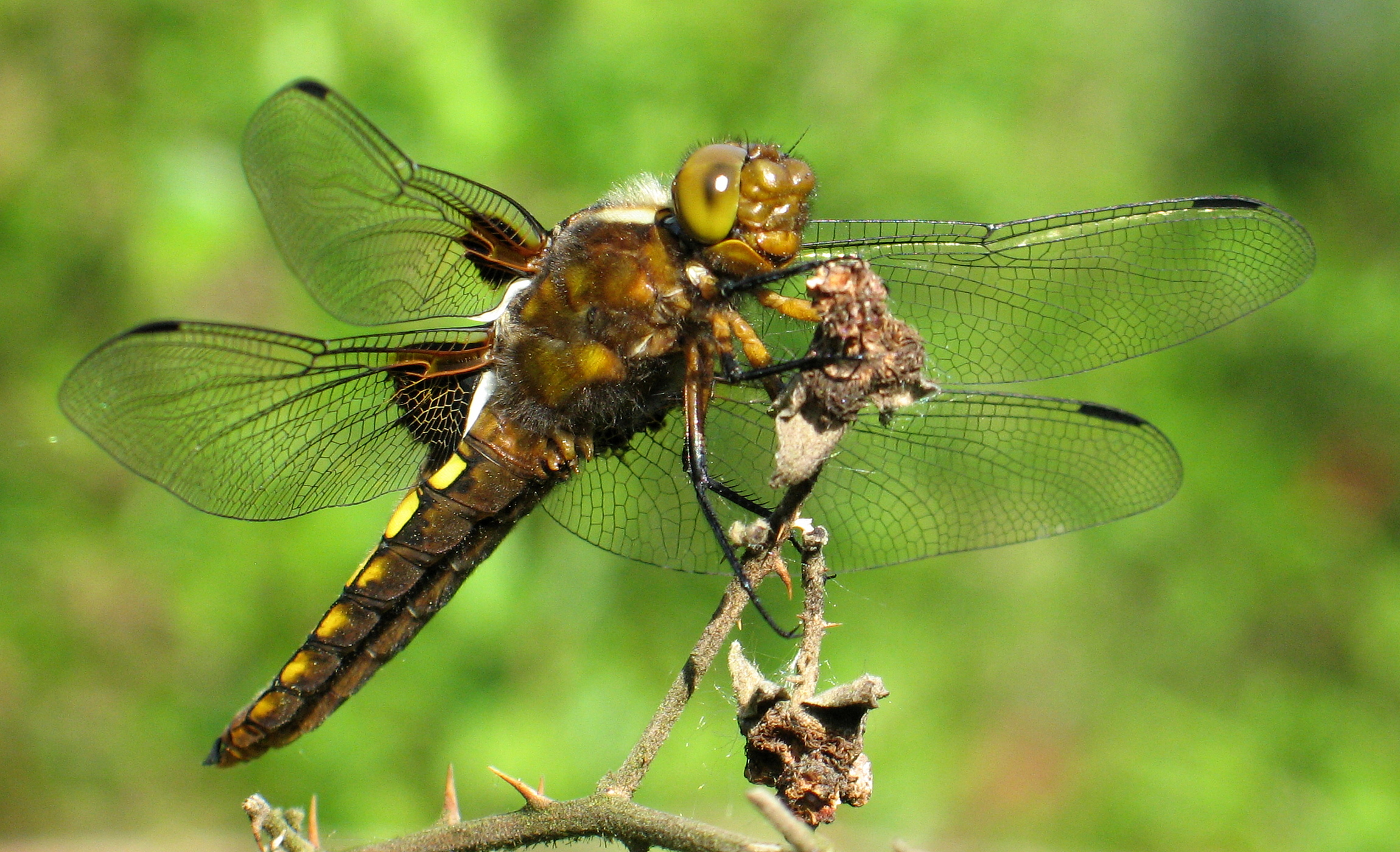 Plattbauch, männchen, unausgefärbt